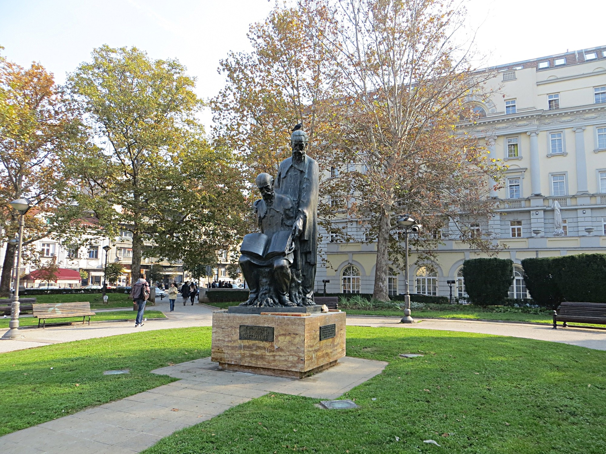 Park Ćirila i Metodija